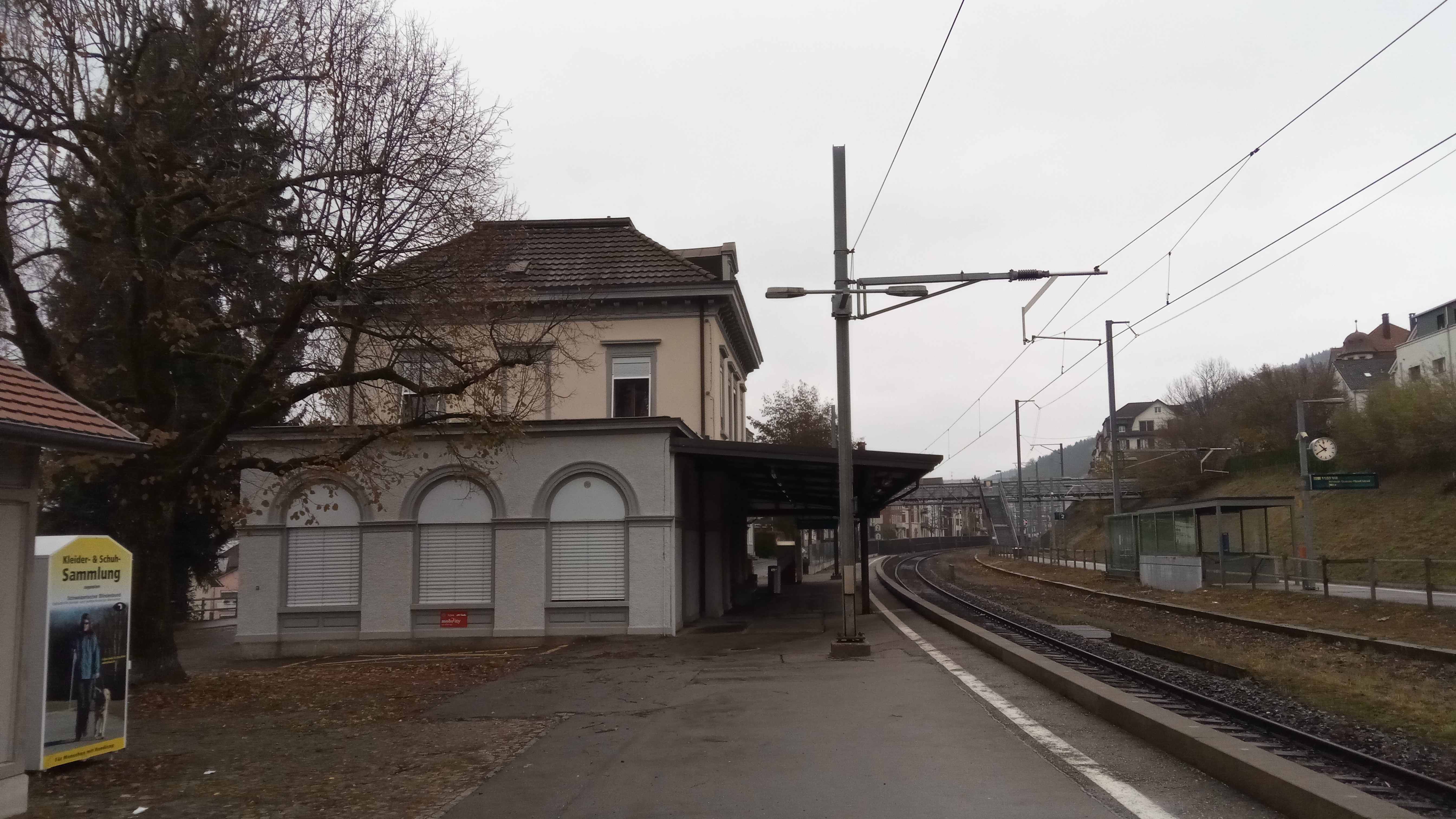 Bahnhofsgebäude St. Gallen Bruggen von Westen